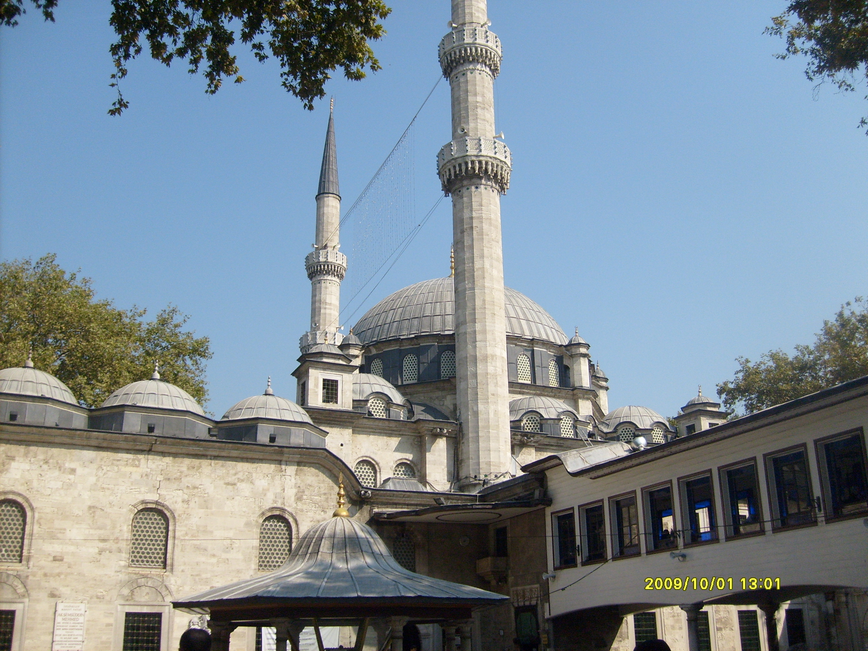 EYÜP SULTAN ÇAMİİ